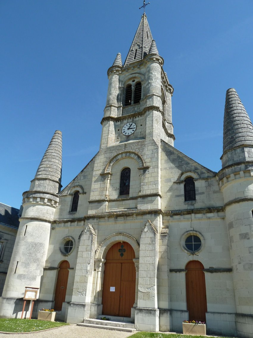 Voici la façade de l’église de Senillé, qui est un trompe l’œil, car elle présente trois portes, mais ne contient qu'une nef.